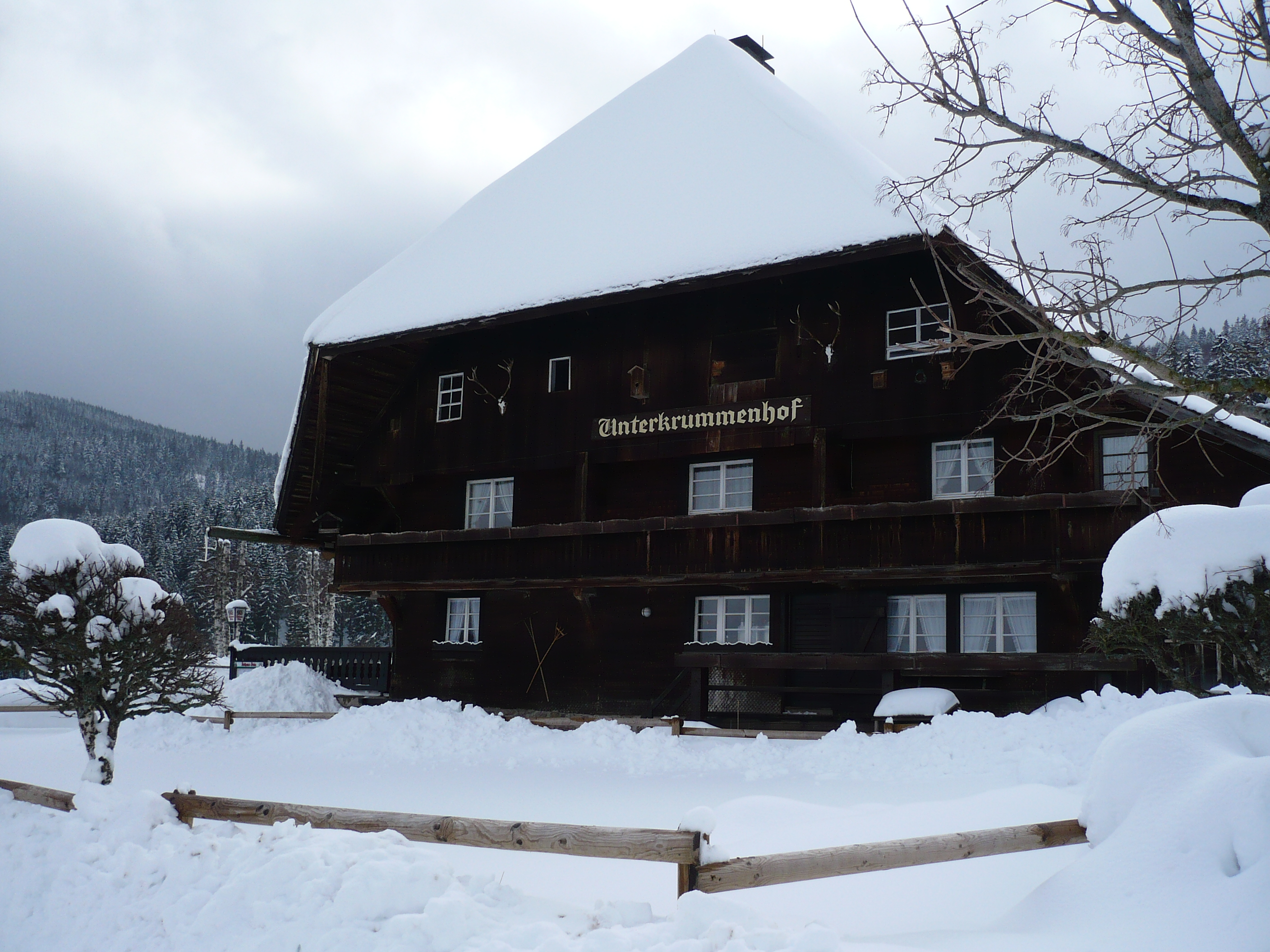 Unterkrummenhof am Schluchsee